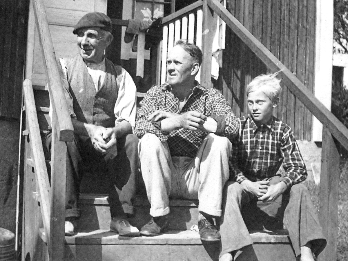 Från vänster i bild: Edvard Österman, sonen Uno Österman och sonsonen Lars-Uno Österman.